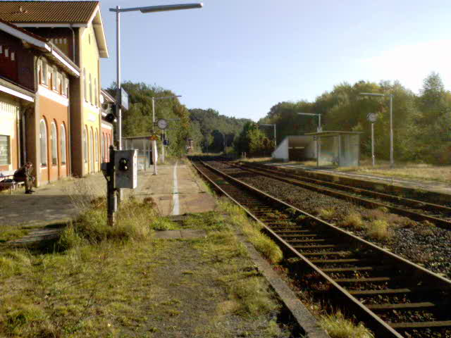 Bahnhof Visselhövede, Blick von Gleis 1 in Richtung Uelzen